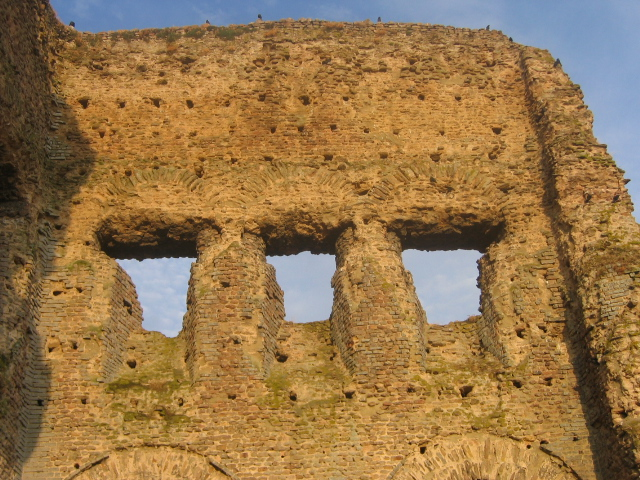 Temple de Janus, Autun, France.